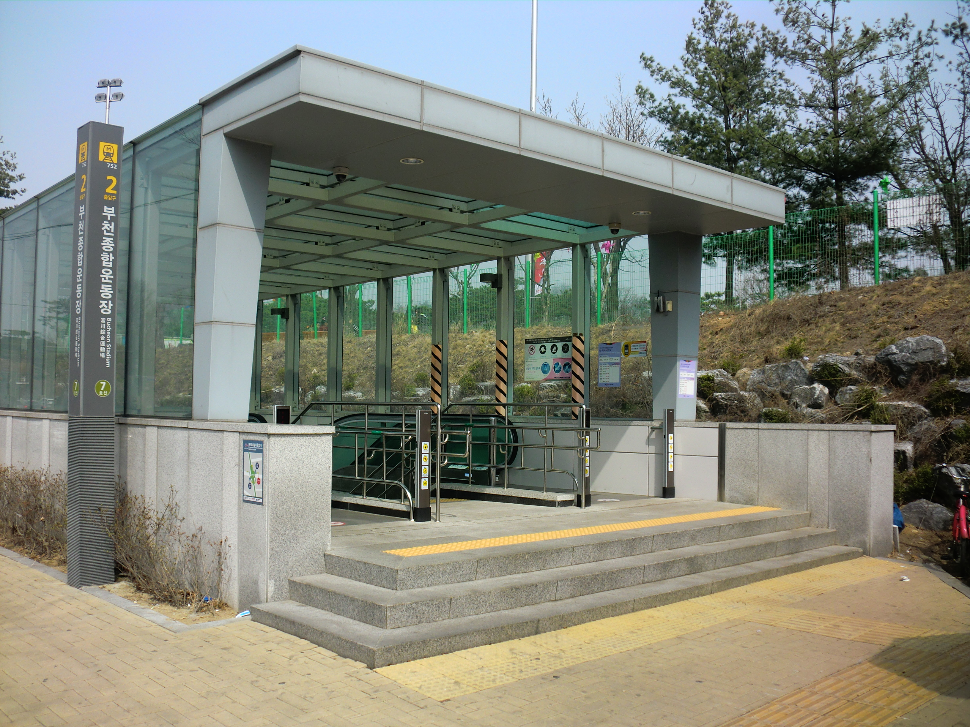 서울특별시도시철도공사 7호선 부천종합운동장역 2번출입구